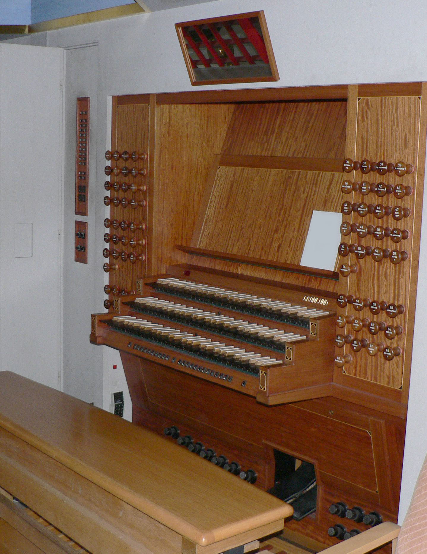 Urkujen soittopöytä - An organ console